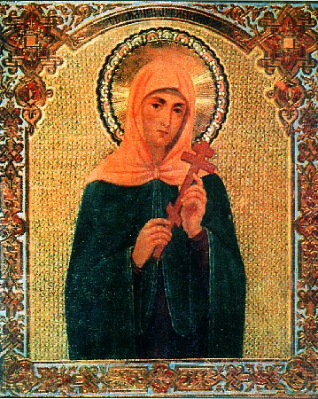 Saint Agrippina